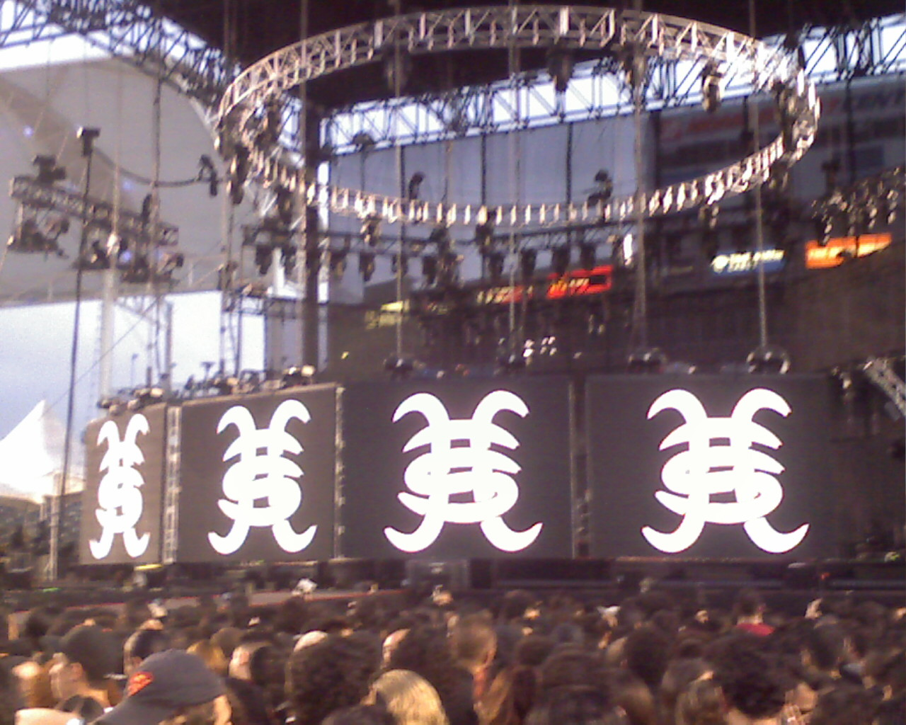 Escenario para el concierto de Héroes del Silencio en el Home Depot Center de Lós Ángeles (2007-09-28)